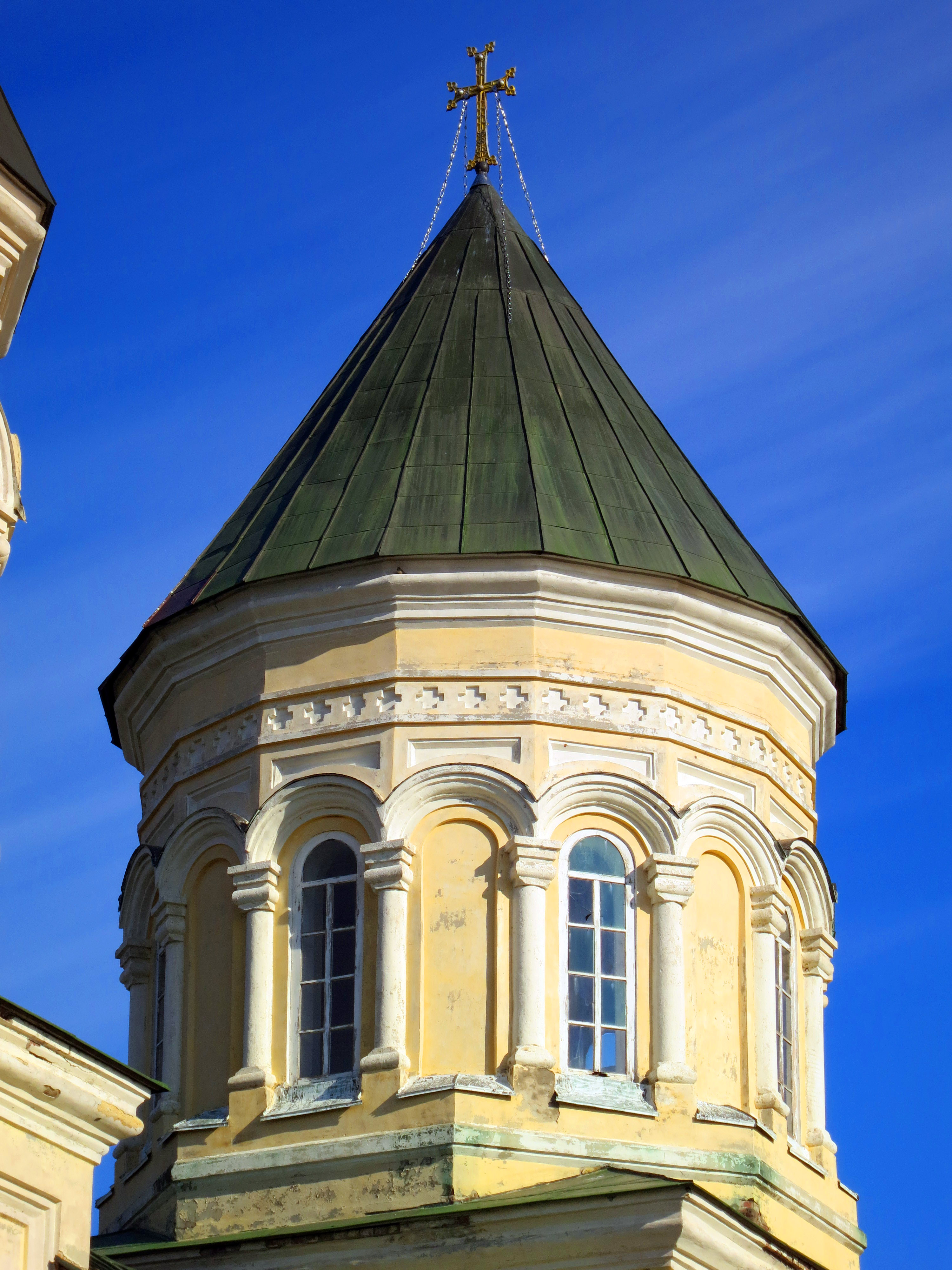 Церковь Сурб-Аменапркич: центр, Крым, Мясниковский район, Ростовская область